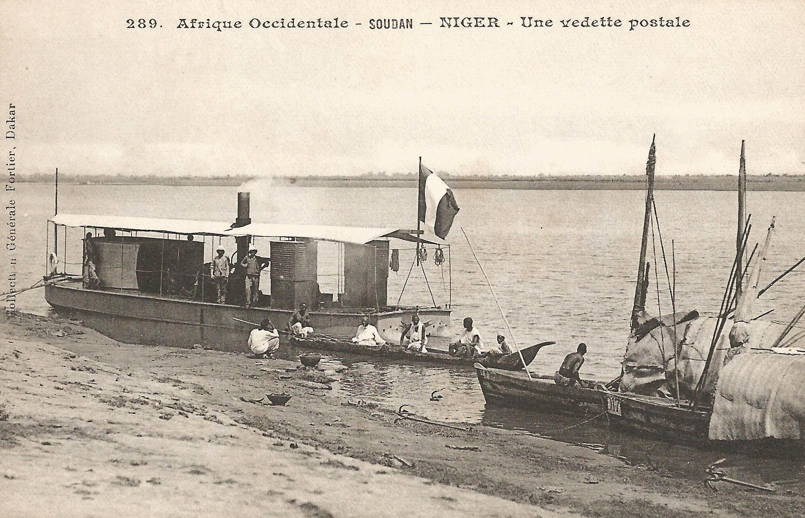 François-Edmond Fortier, Une vedette postale sur le Niger. Afrique Occidentale - Soudan.